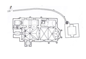 pôdorys kostola Sv. Juraja s renesančnou zvonicou a hradbami